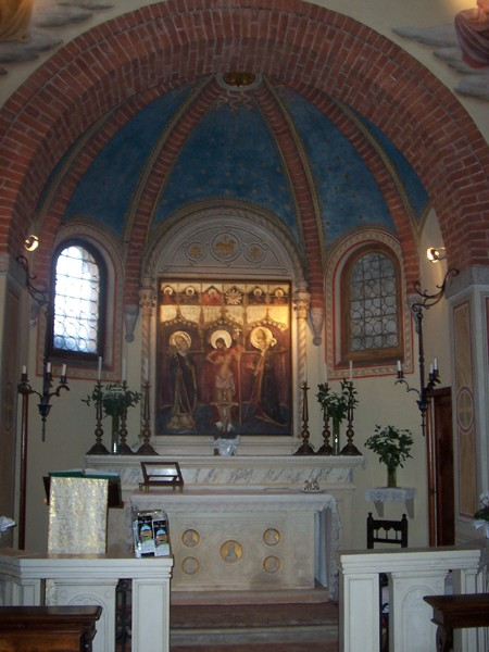 Brugherio - Interno della Chiesa di S. Ambrogio